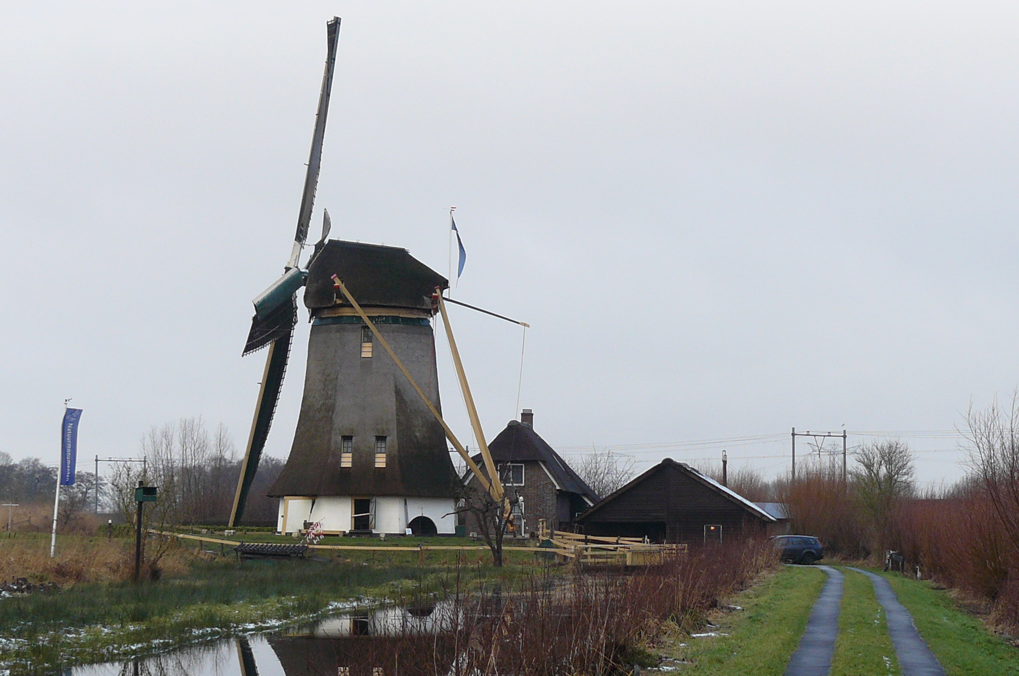 Molen De Onrust vanaf De Goog. De foto is naar het westen genomen en op de voorgrond ligt het boezemkanaal dat naar het Naardermeer loopt. De molen slaat vooral water uit het Naardermeer in de Uitwatering van het Naardermeer die net onder Muiden de Utrechtse Vecht bereikt.